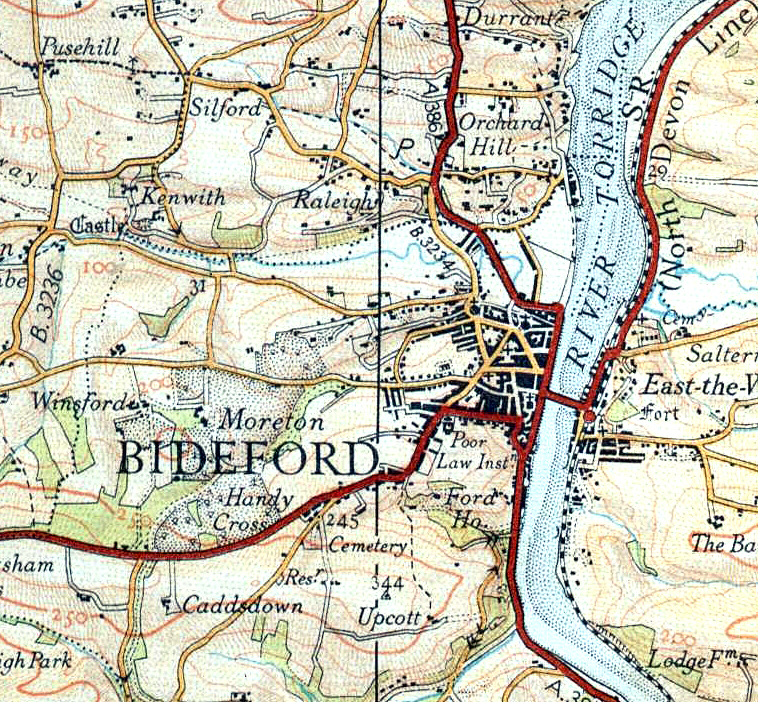 OS map from 1937